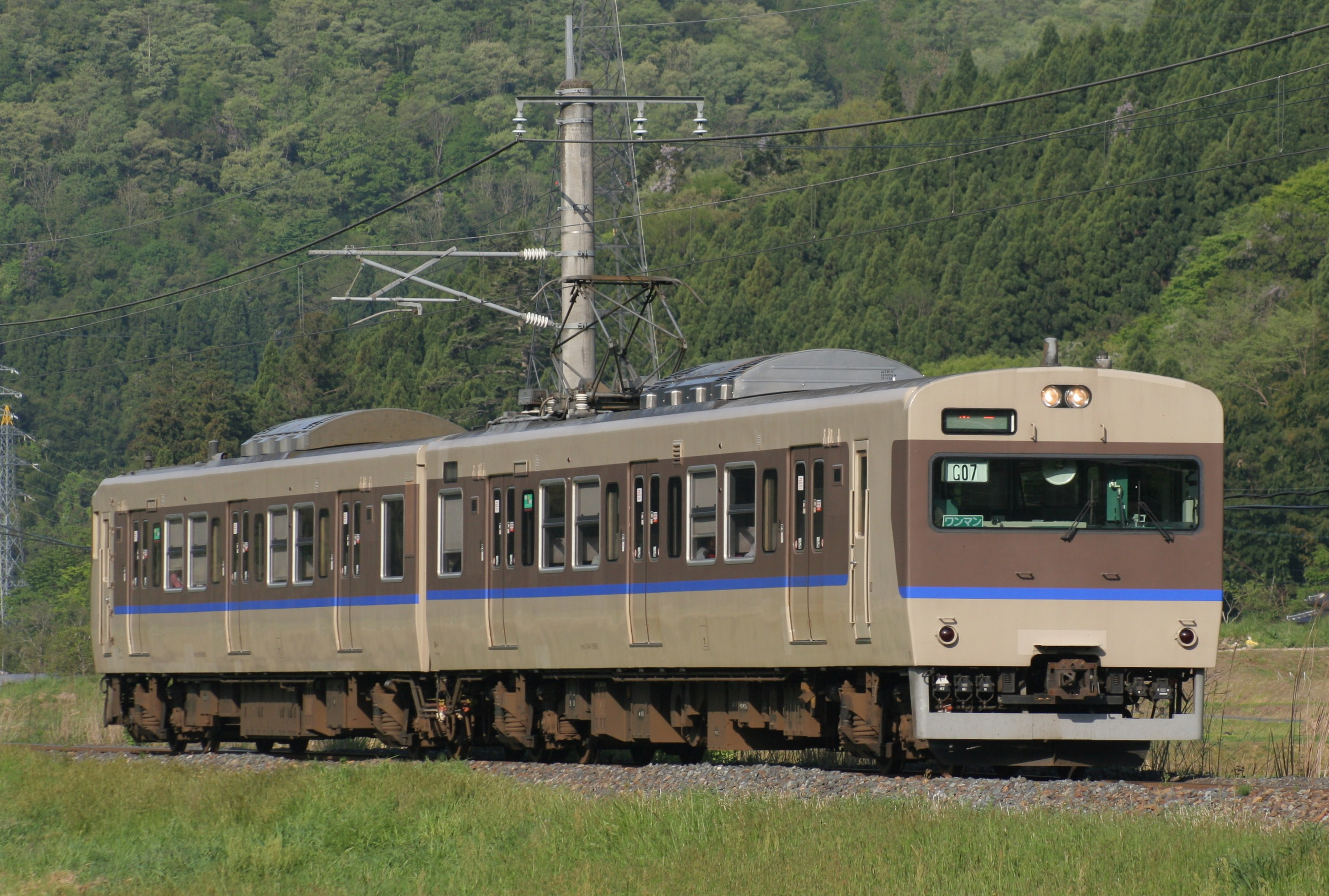 JR西日本115系電車1000番台 G07編成 伯備線、黒坂 - 根雨